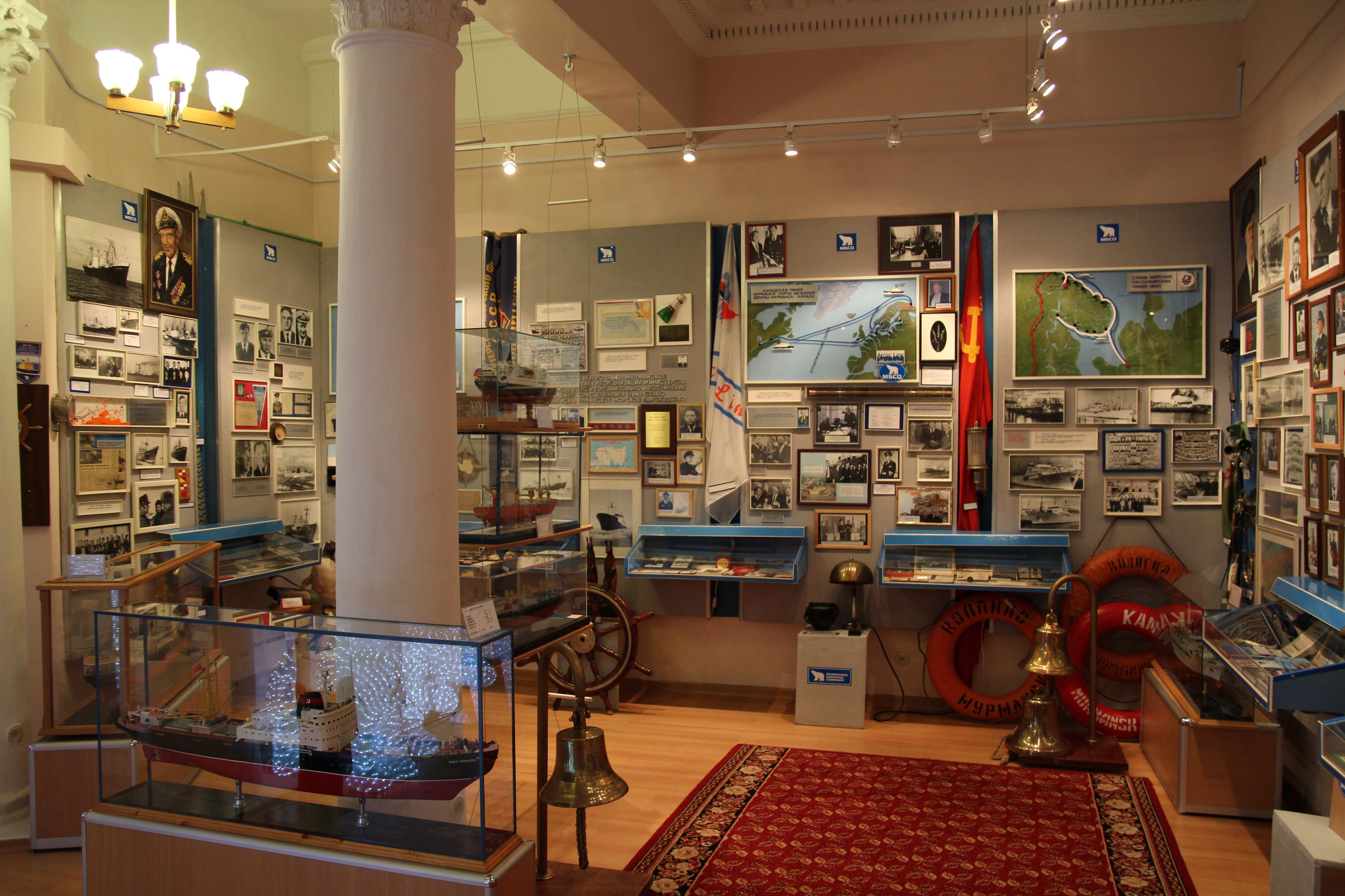 Музей Мурманского морского пароходства